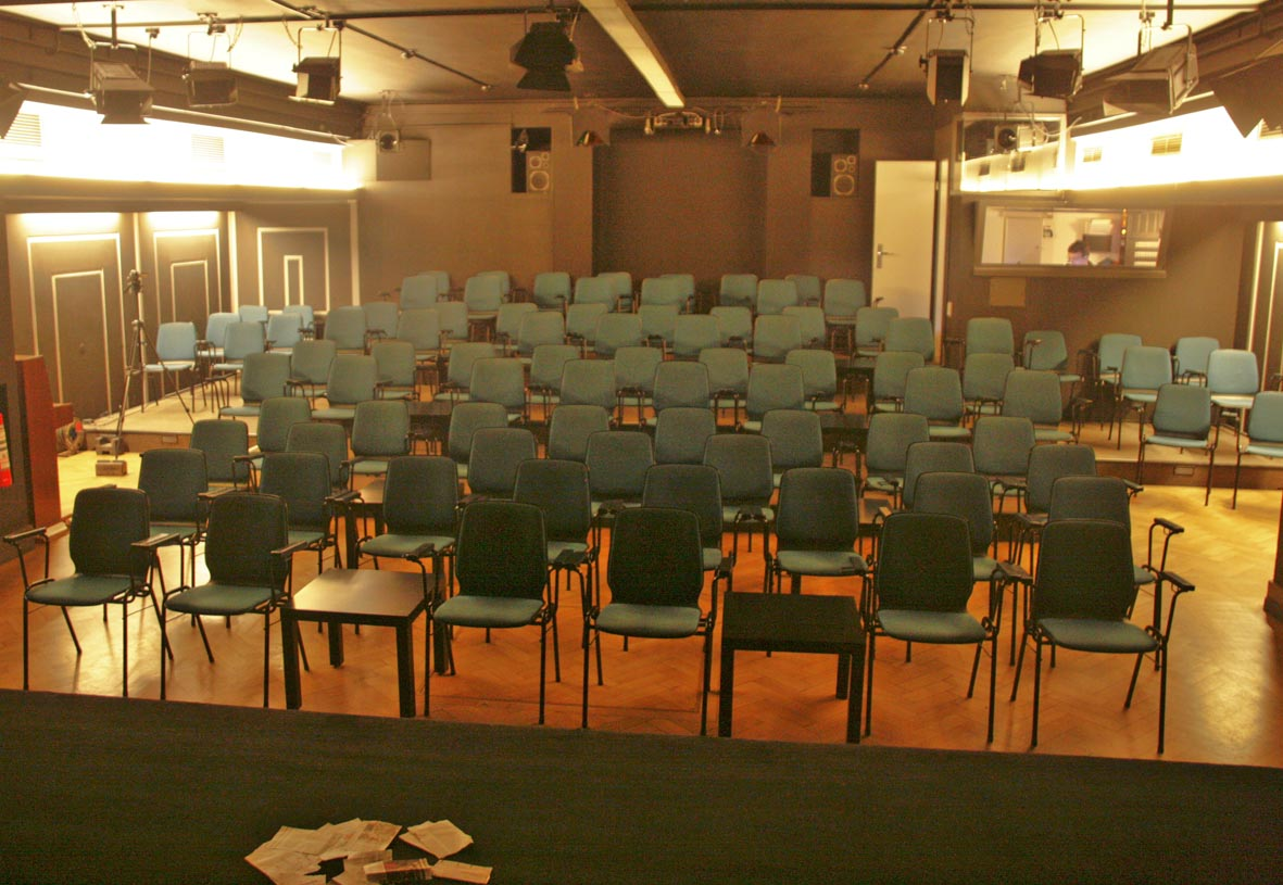 Zuschauersaal des Theaters